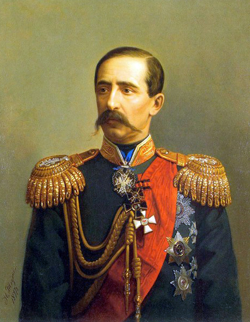 Тюрин Иван Алексеевич - Портрет Александра Львовича Потапова